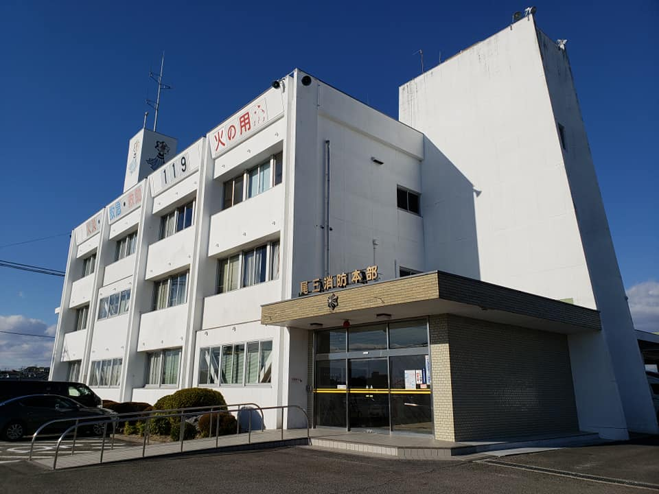 2019年9月20日 午後1時47分 撮影